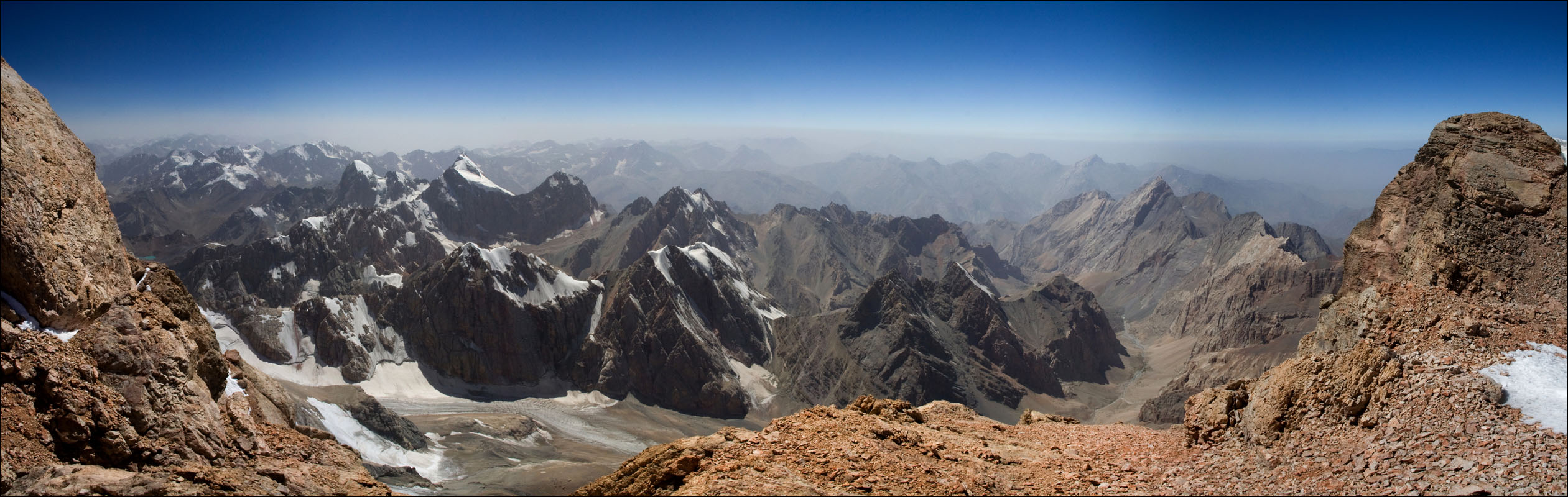 панорама с в. Чимтарга (2Б, 5494), Фаны 2008